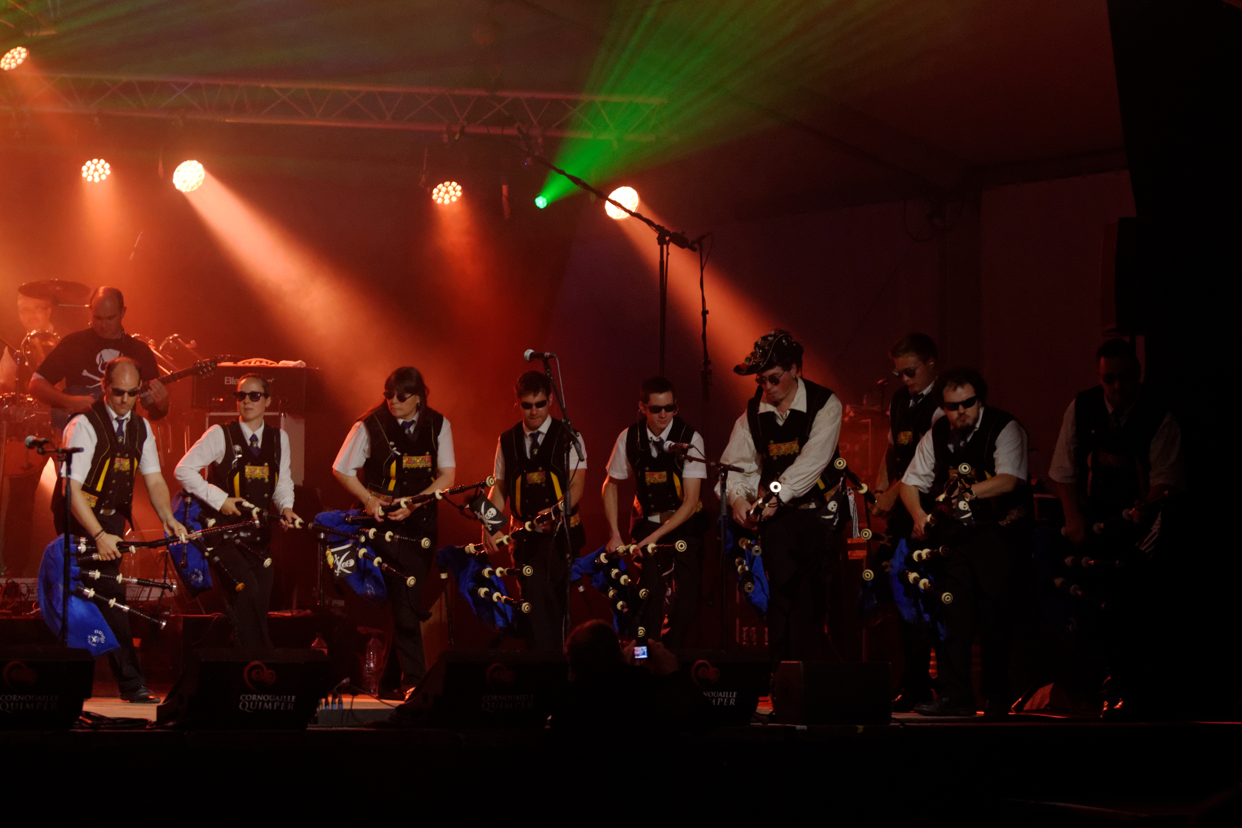 Création « Encore » du Bagad Brieg lors du festival de Cornouaille le samedi 27 juillet 2013 à l'Espace Évêché.